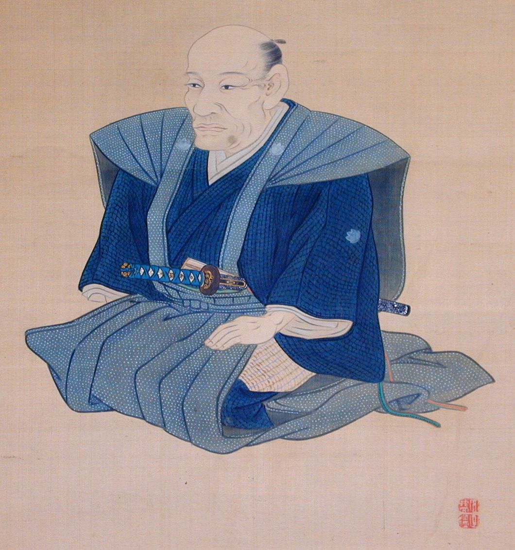 「岡本豊彦」の肖像画。塩川文麟筆。画像はファイル作成者が撮影したもの。